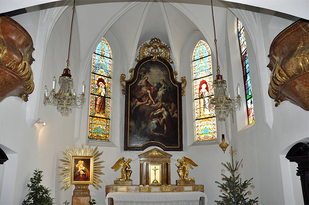 Inneres der Maurer Pfarrkirche (alter Teil) in Wien